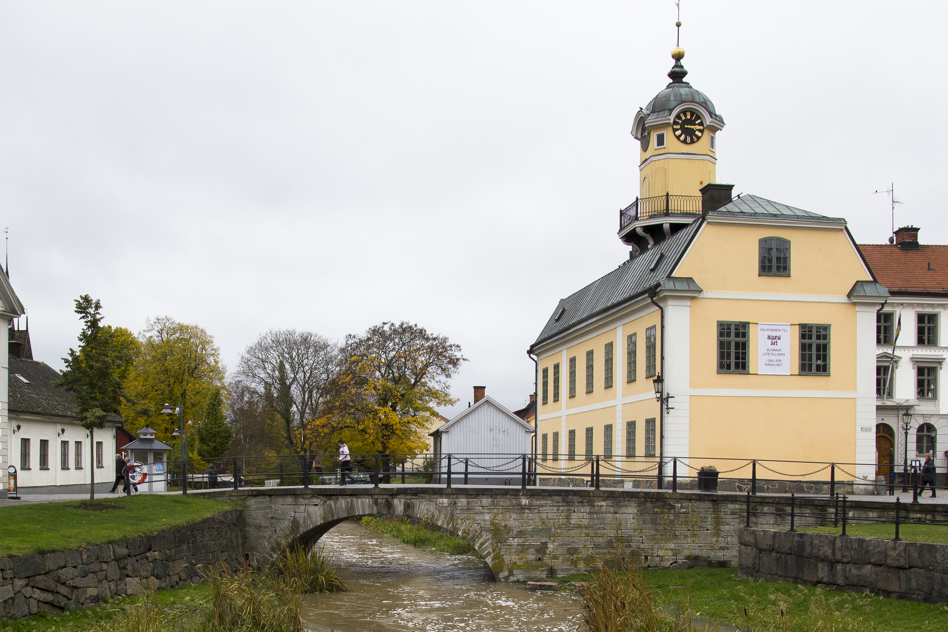 Bro, Storgatan, österifrån.